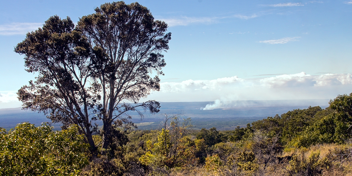 Иллюстрация для викиучебника Гавайеведение